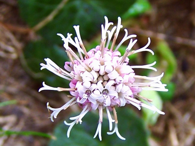 Homogyne alpina (pl. podbiałek alpejski), habitat: Tatra Mountains, Hala Upłaz